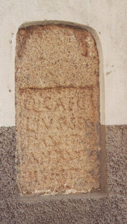 CIL II, 700. Epitafio de Cáceres en la antigua puerta de Mérida: Q(uintus) Cae/cilius Q(uinti) F(ilius)/ Avitus/ AN(norum) LXX/ H(ic) S(itus) E(st) S(it) T(ibi) T(erra) L(evis)